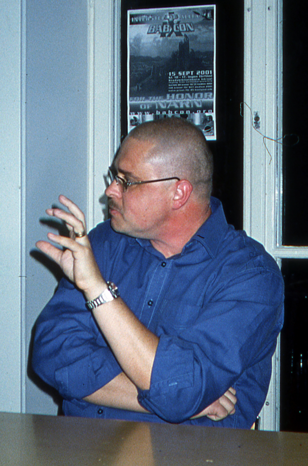 Lars Jakobson som hedersgäst på science fiction-kongressen Akrostikon 2001.